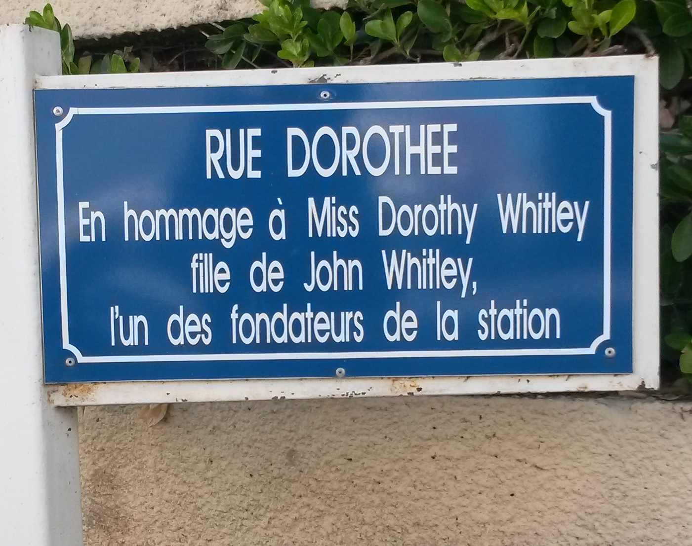 Le Touquet-Paris-Plage 2019